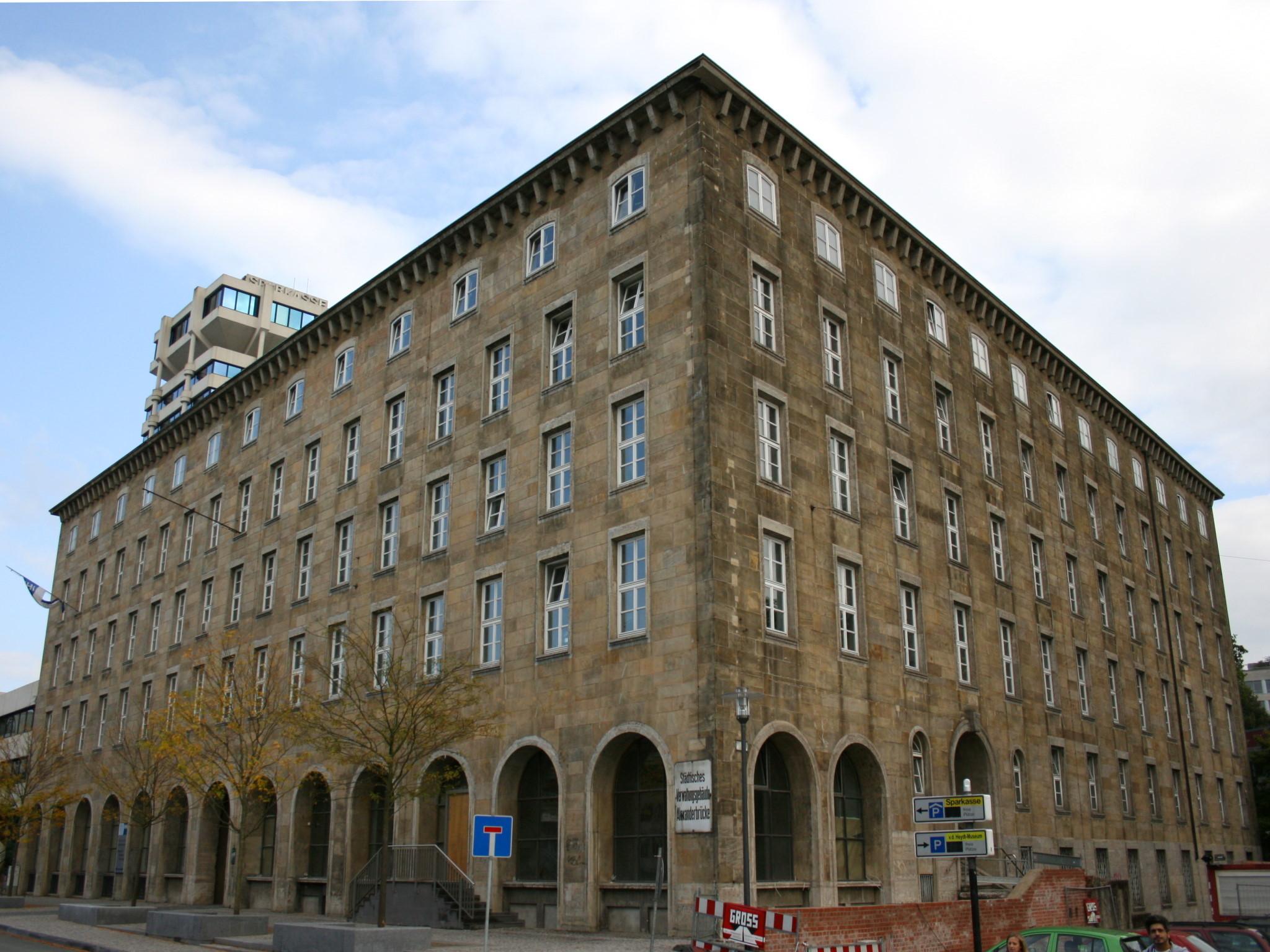 Städtisches Verwaltungsgebäude Alexanderbrücke in Wuppertal